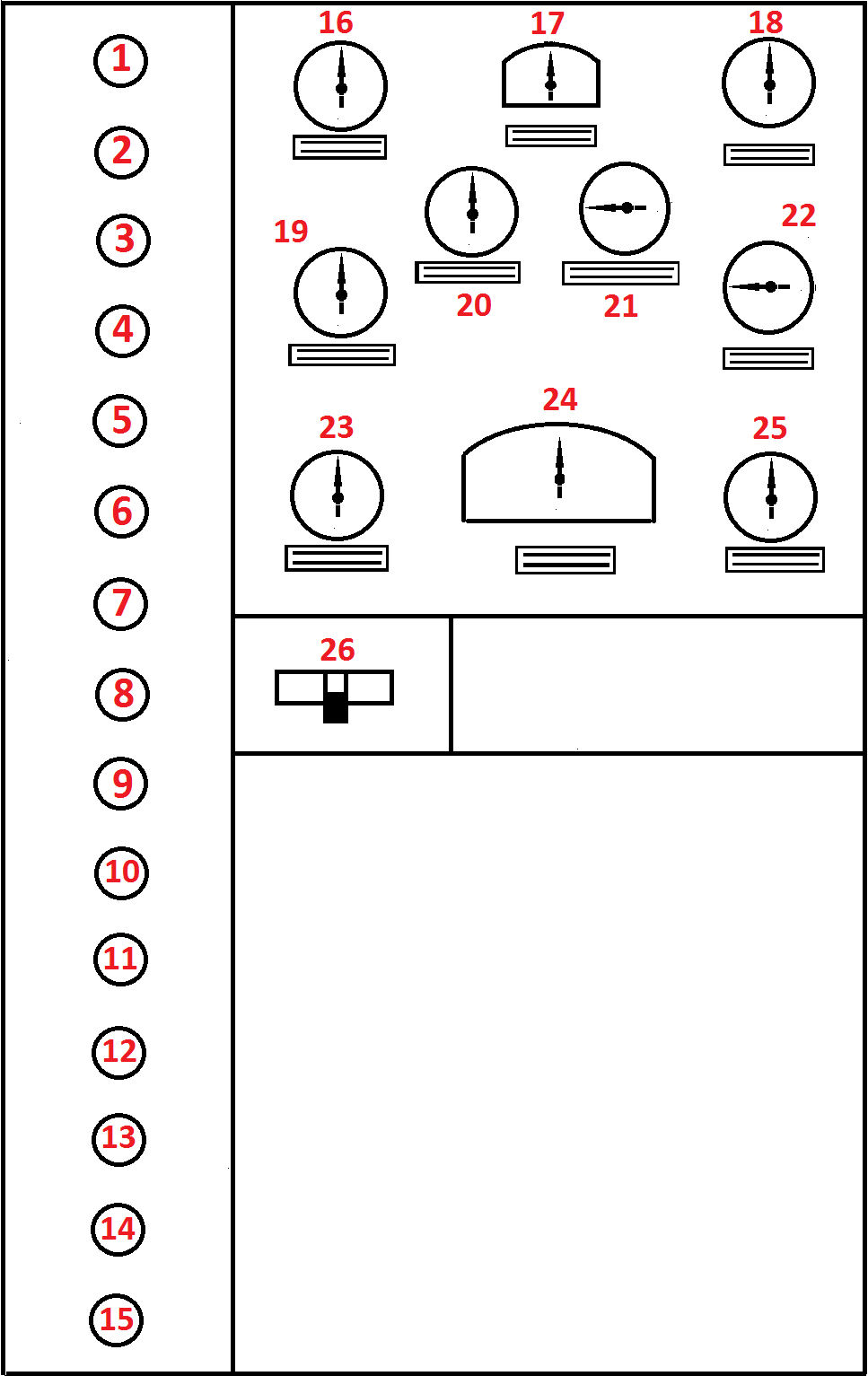 Схема пульта управления тепловоза ТЭ1